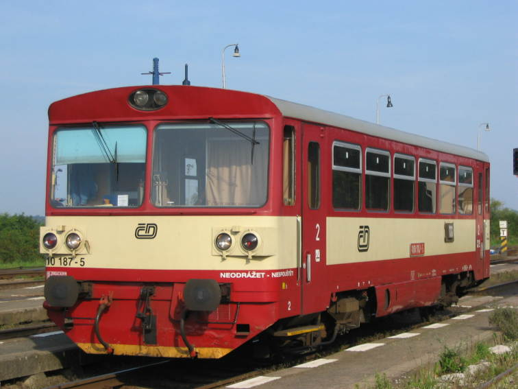 Motorový vůz 810, oblast stanice Libuň